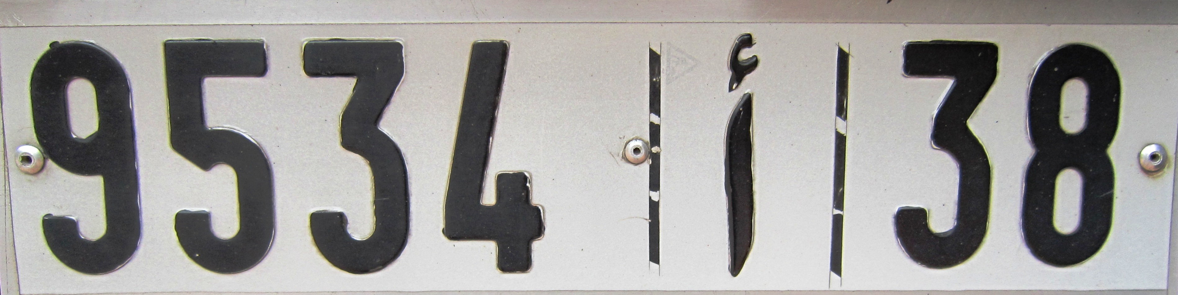 kentekenplaat Marokko 1